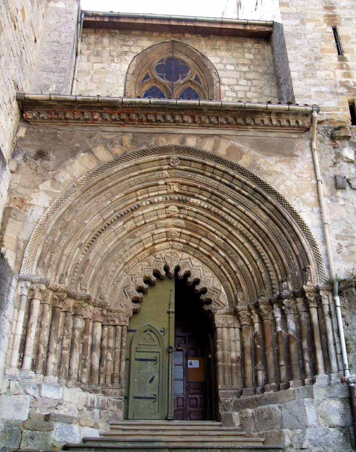 Iglesia de San Pedro de la Rúa, Estella (Navarra)